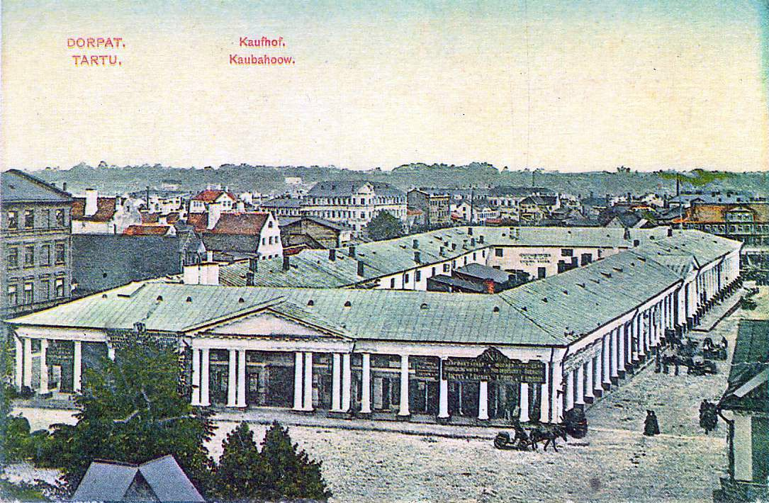 Tartu Kaubahoov, umbes 1907.